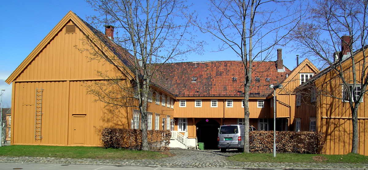 Tukthuset, Kongens gate 85, Trondheim. Gården sett fra sør. Bygd omkring midten av 1700-tallet. Ombygd til fengsel 1770; arkitekt Heinrich Kühnemann.